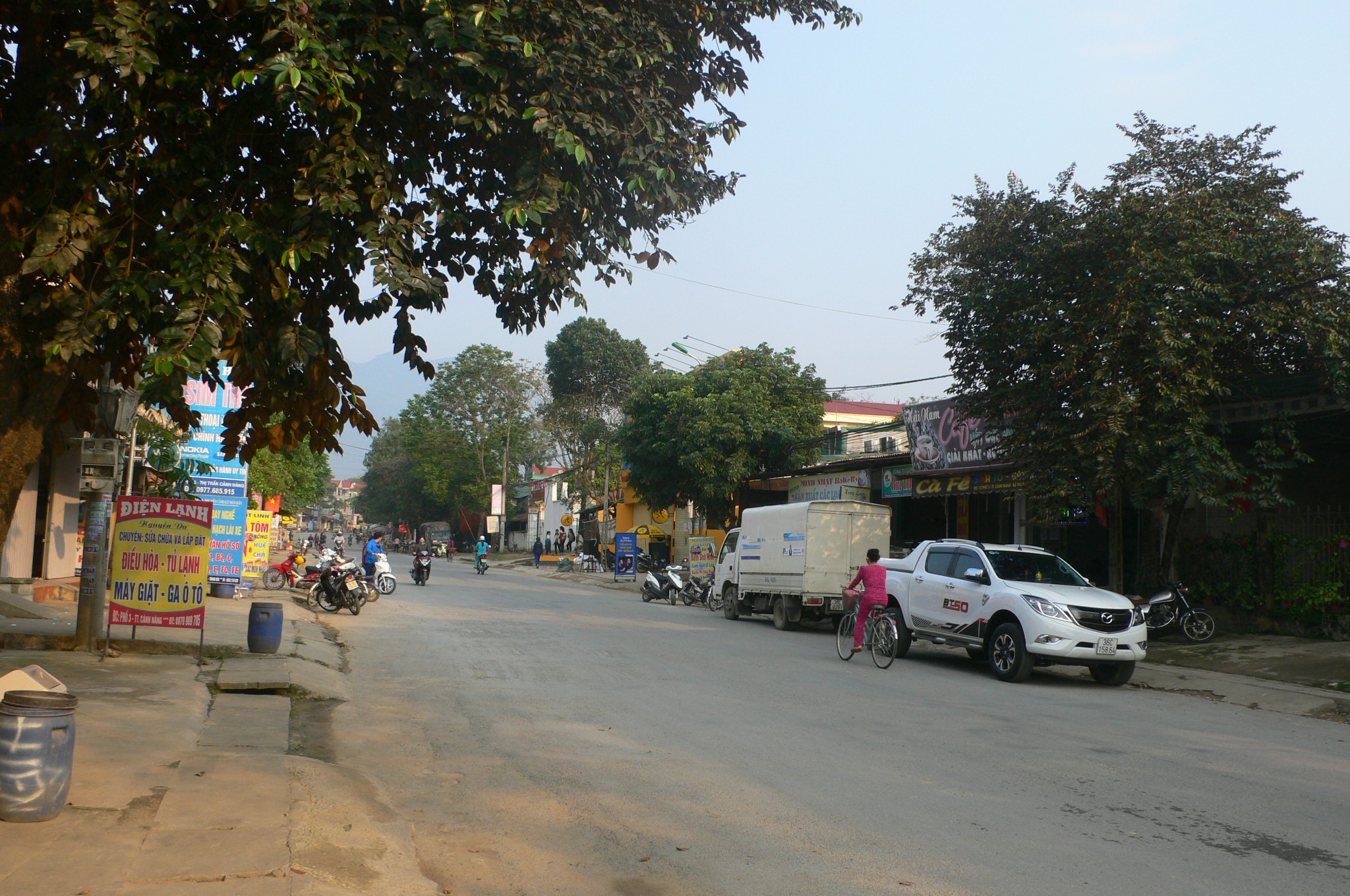 Thị trấn Cành Nàng, huyện Bá Thước, tỉnh Thanh Hóa